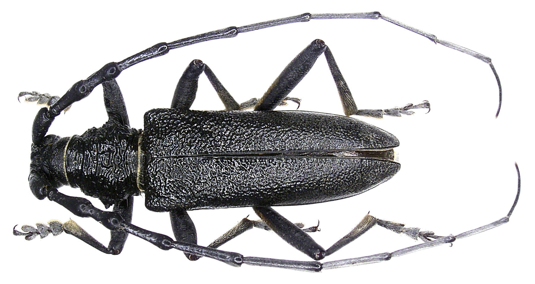 Familie: Cerambycidae Groesse: 17-28 mm Verbreitung: Europa Ökologie: Entwicklung in Laubholz Fundort: Jugoslavien, Montenegro, Sutomore leg.det. U.Schmidt, 1982 Photo: U.Schmidt, 2005